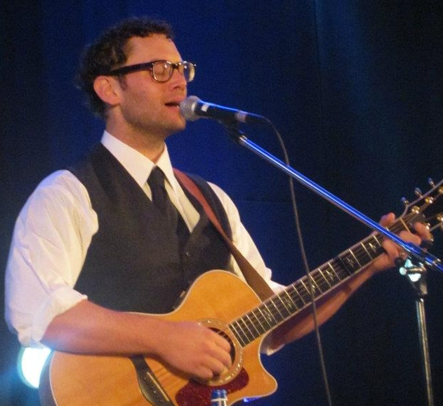 Jason